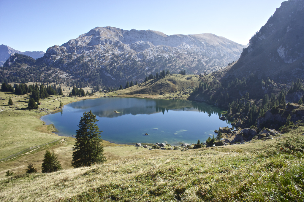 Seehorn mit Seebergsee im Diemtigtal